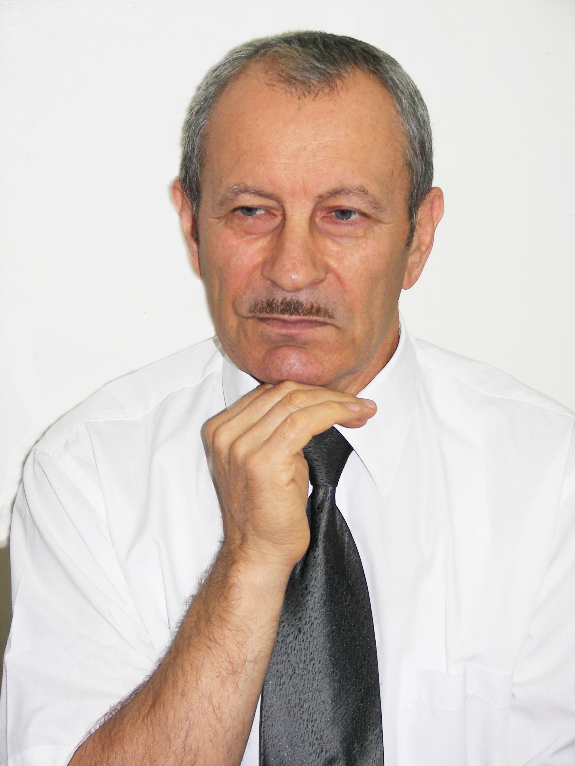 Портрет